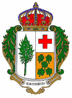 Escudo de Oliva de la Frontera Extremadura Badajoz